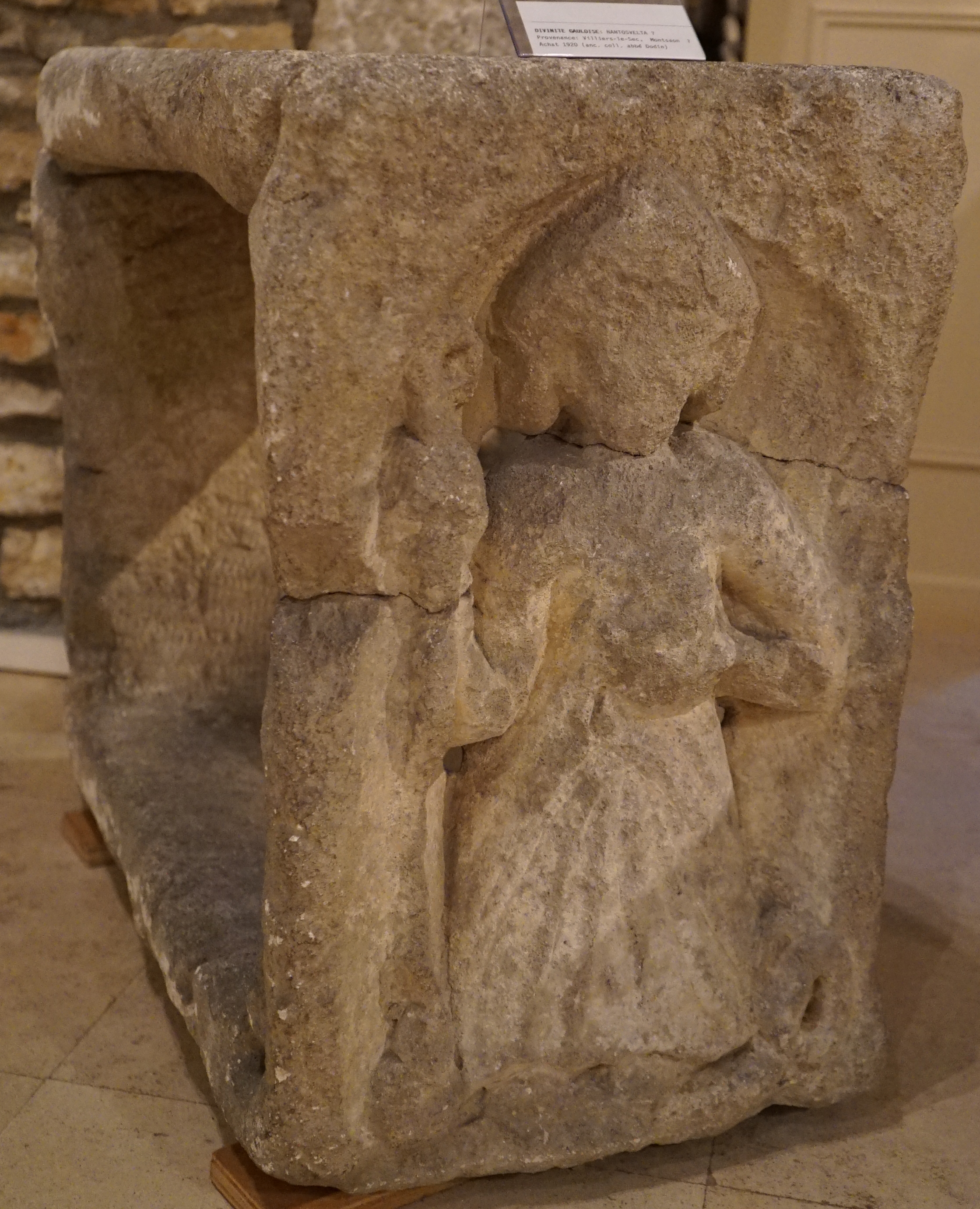 présenté au musée.